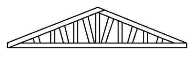 Jednoduché schéma příhradového vazníku